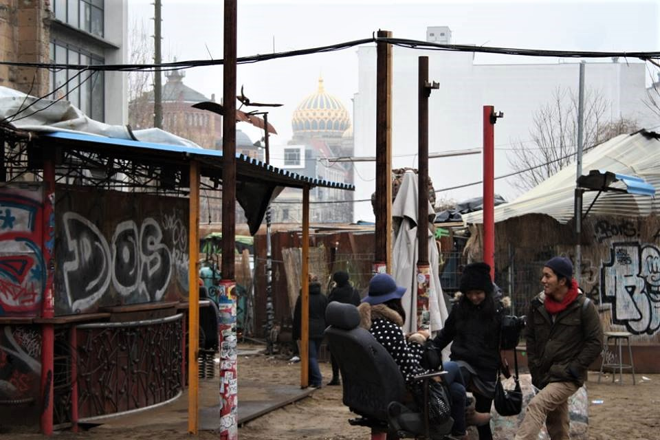 L'ancienne poste et la nouvelle synagogue depuis les jardins arrières de Tacheles sur la Oranienburger Strasse à Berlin-Mitte